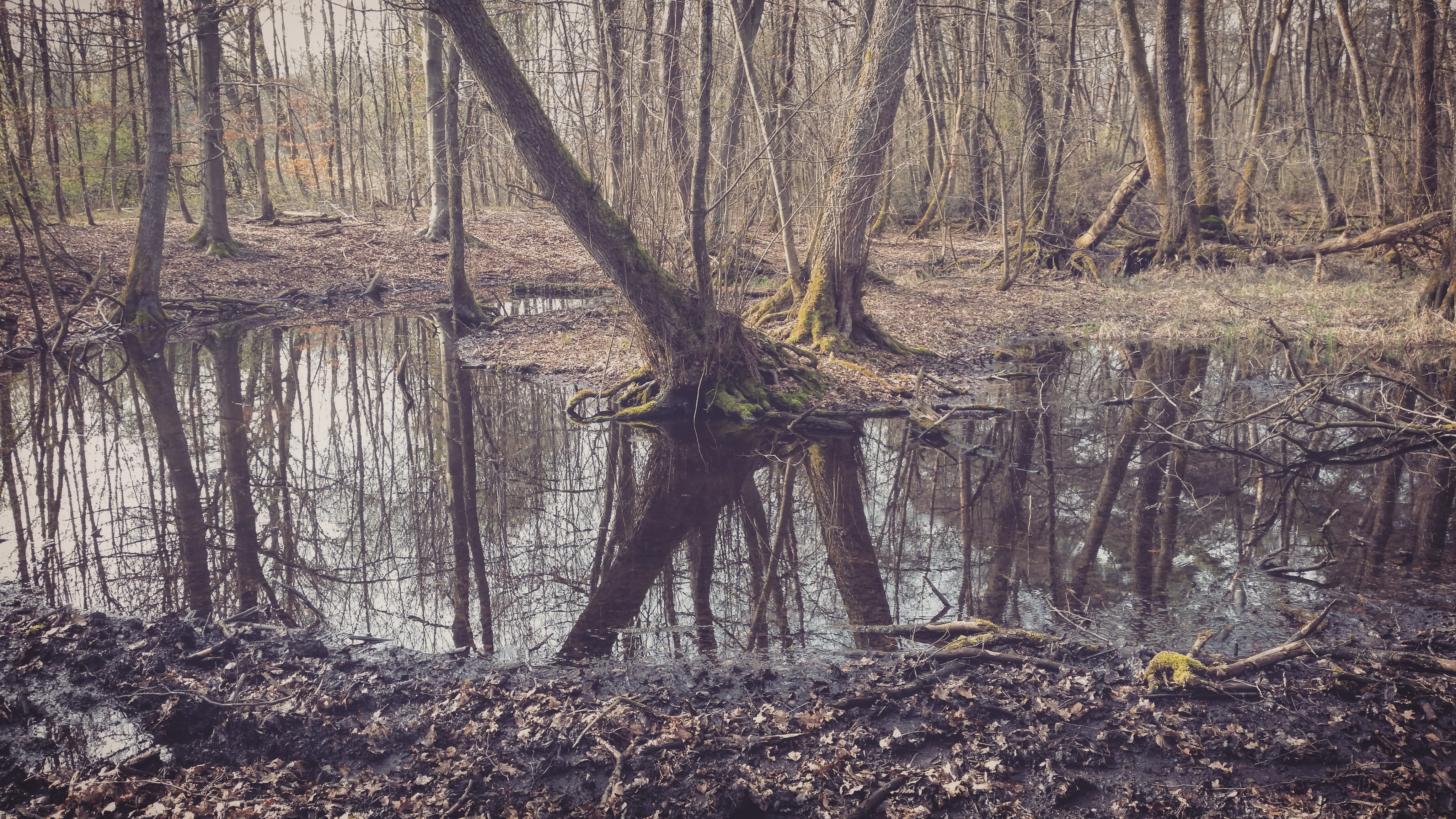 Das Bild zeigt die Schifflache im Naturschutzgebiet „Schifflache bei Großauheim“; der fotografierte Ort befindet sich im Wald zwischen Kahl am Main und der Stadt Hanau.